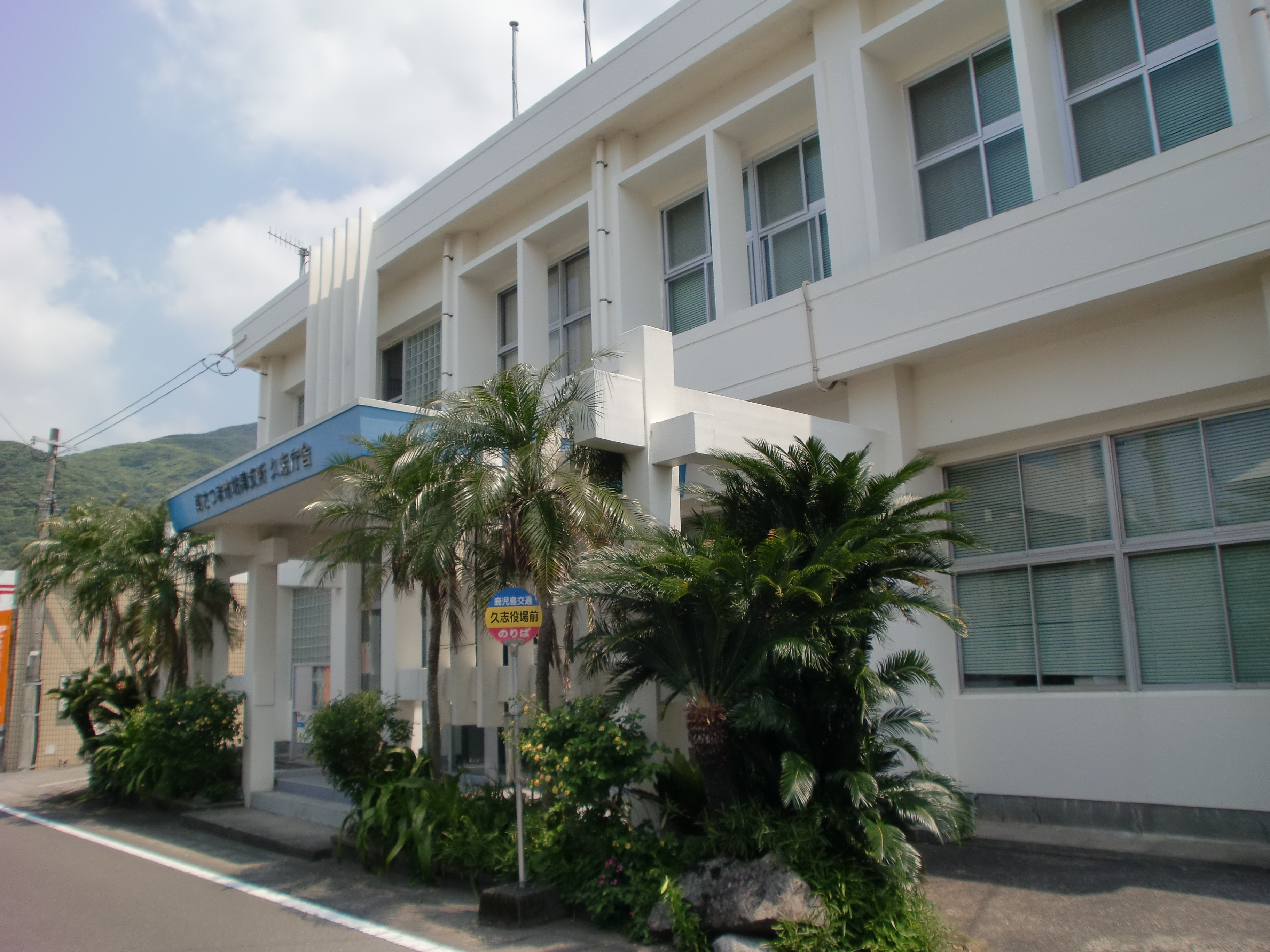 南さつま市役所坊津支所久志庁舎（旧坊津町役場）の外観。